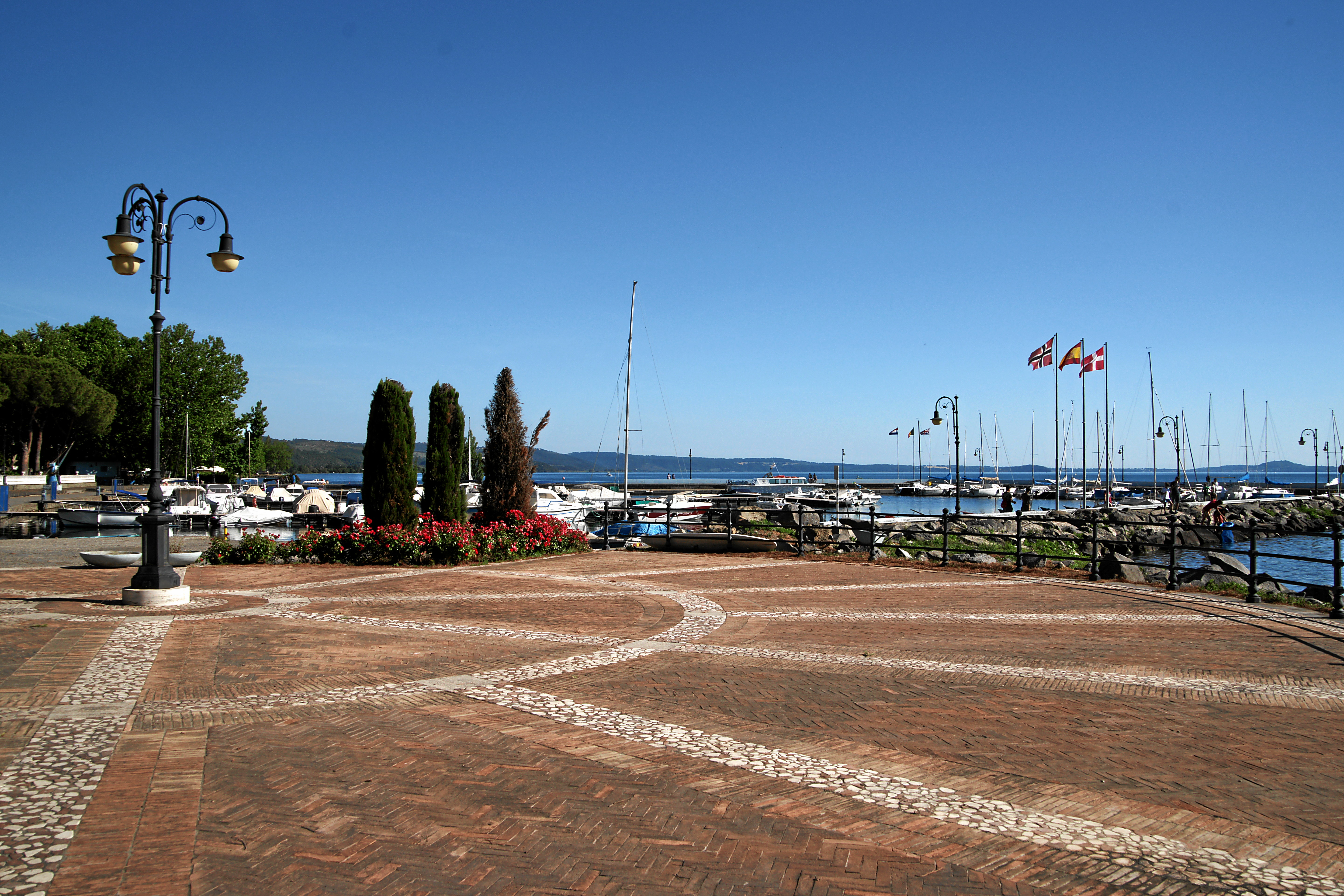 Bolsena: Seepromenade